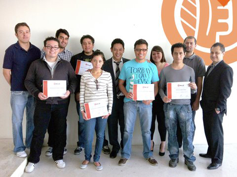 Graduados del Diplomado en Desarrollo de Aplicaciones Móviles impartido por NA-AT Technologies® durante mayo de 2012